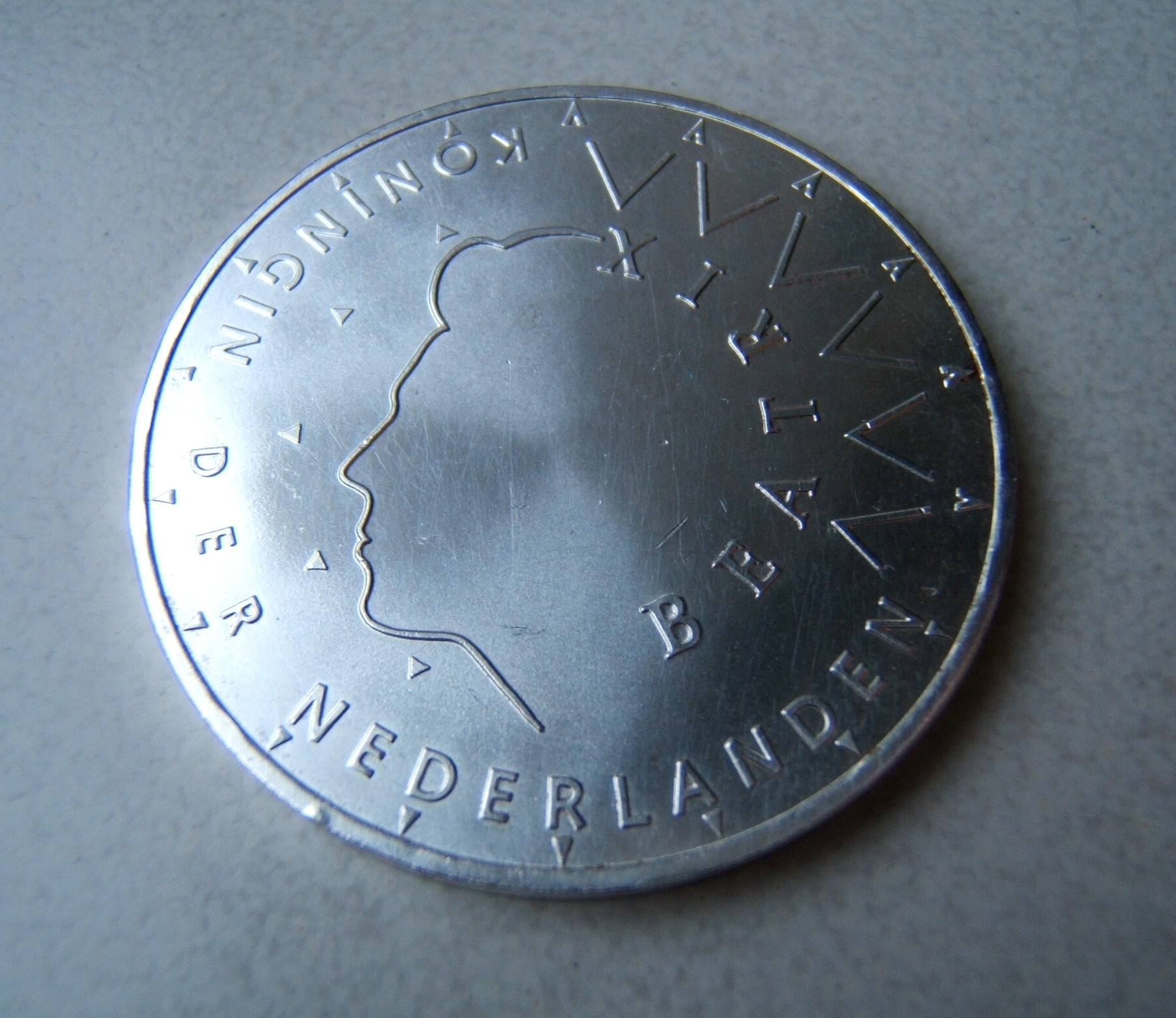 (Original text: Nederlandse 50 gulden munt, Juliana & Bernhard 50 jaar getrouwd, kopzijde)